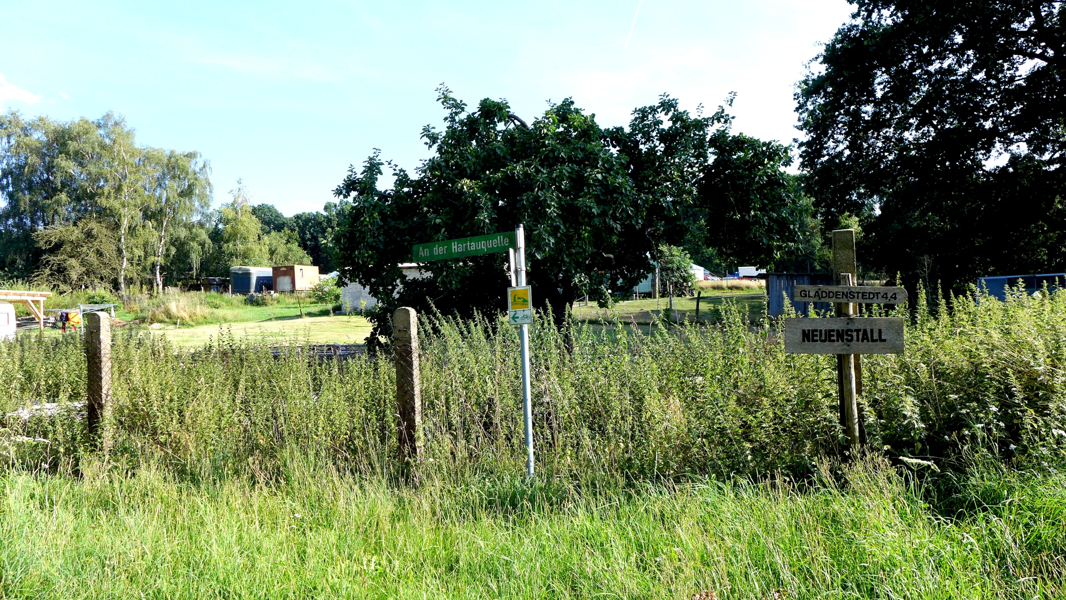 Neuenstall ist eine Splittersiedlung der Gemeinde Jübar in Sachsen-Anhalt. Das Siedlungsbild ist alternativ geprägt von einigen festen Häusern, vielen Wohnwagen, Wohnomnibussen, Buden und Zelten. Aufnahmedatum 2016-07.